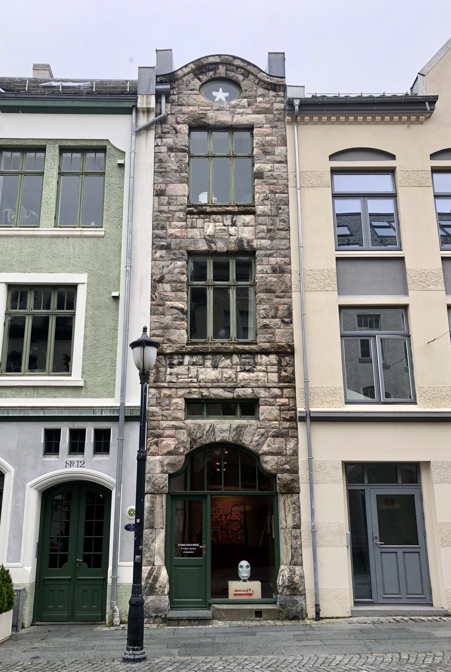 Schmalstes Haus in Ålesund